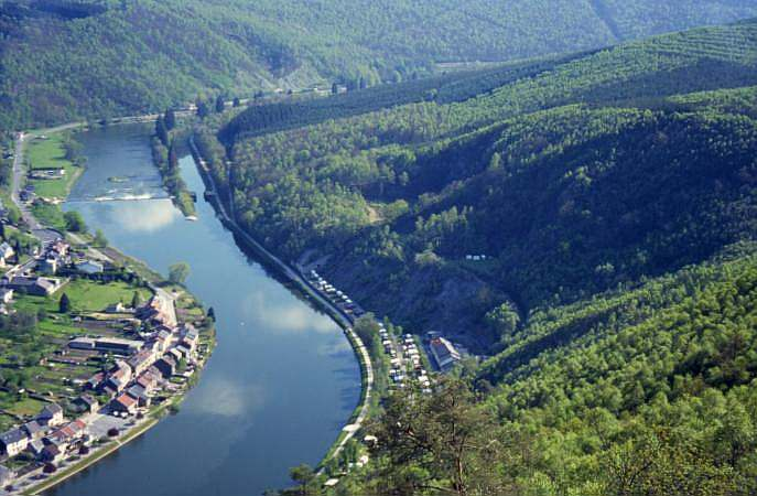 D'Meuse zu Monthermé (Ardennen).